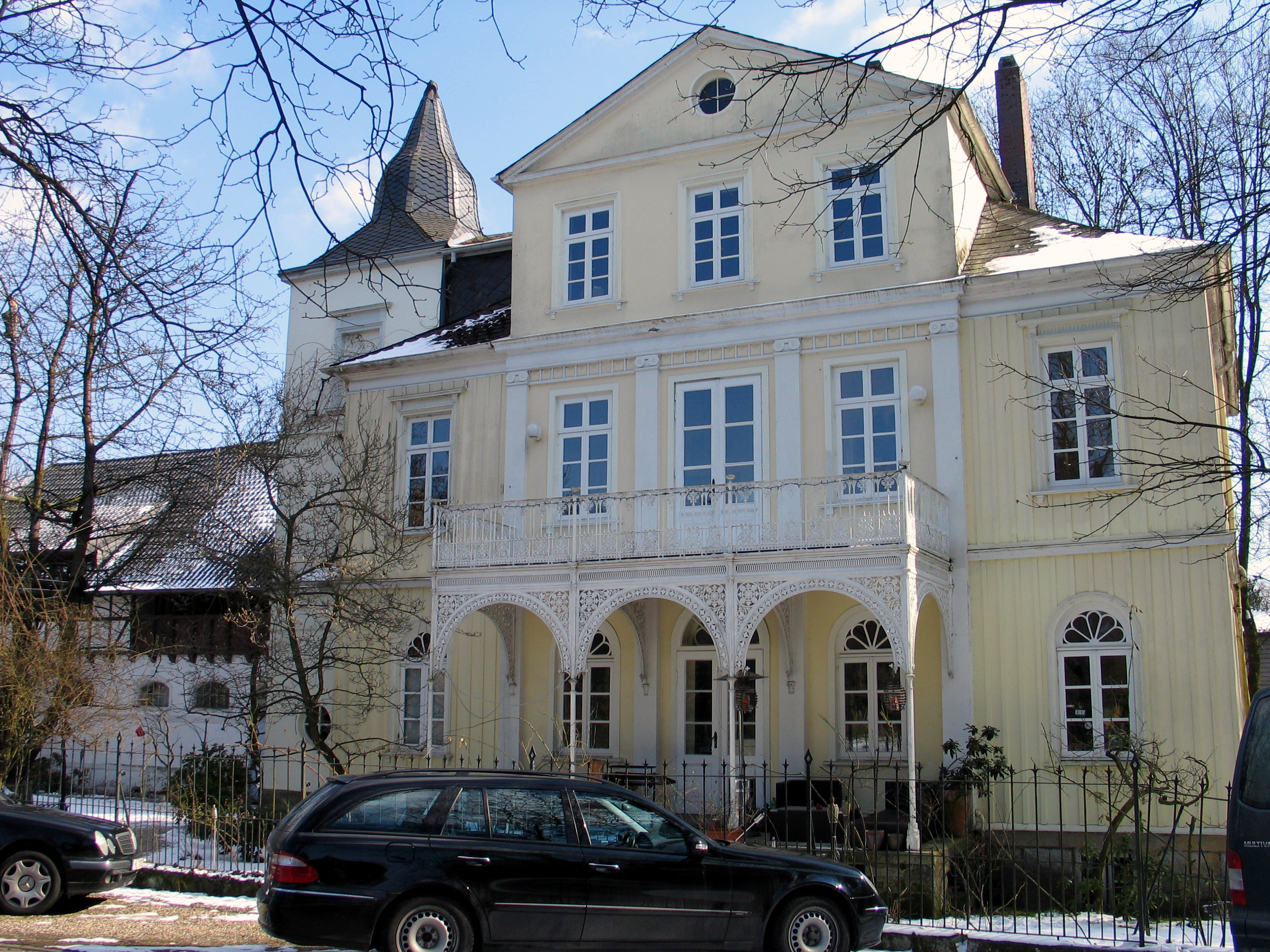 Vorderansicht der Villa Beckedorff, das ehemalige, 1817 durch den Hofarchitekten Georg Ludwig Friedrich Laves für die Mistreß Amalie Beckedorff errichtete Gartenhaus, das der Vollmeier F. Wedekind 1873 nach Limmer translozieren und mit einem Turmanbau versehen ließ. Links im Bild die 1897 ergänzte Remise ...